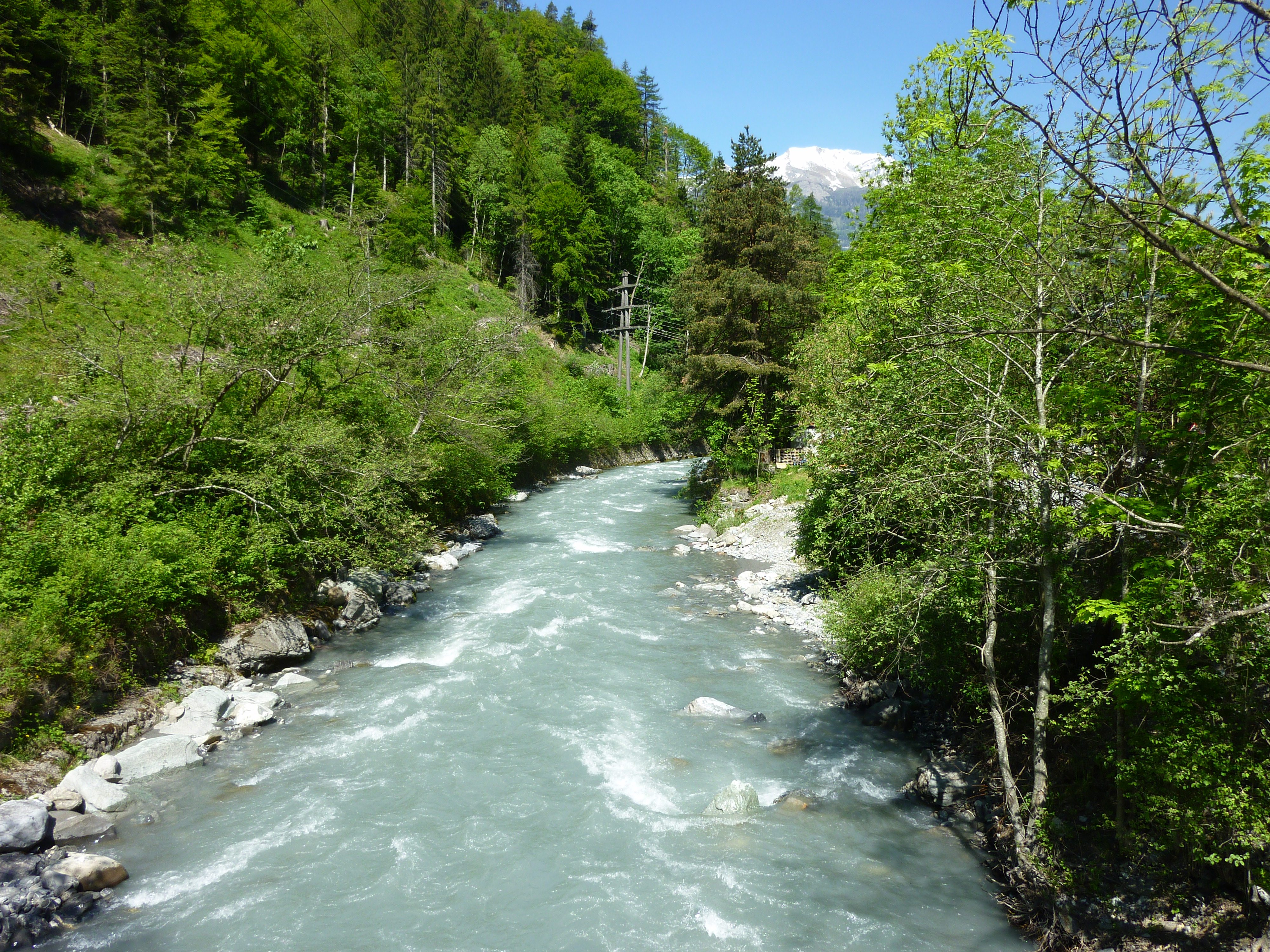 Plessur unterhalb von Araschgen